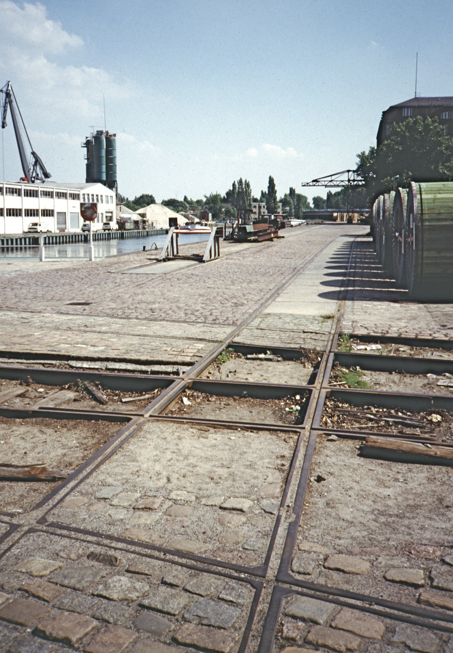 Industriebahn Neukölln, Oberhafen